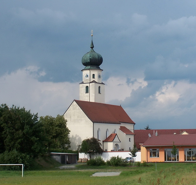 Kößnach St. Gangolf. Die Kirche wurde in der zweiten Hälfte des 15. Jahrhunderts erbaut. Das Langhaus wurde im 16. Jh. verändert. Aus dieser Zeit stammt auch die südliche Vorhalle. Einrichtung barock um 1710. Turm mit vier Geschossen an der Nordseite des Chores.